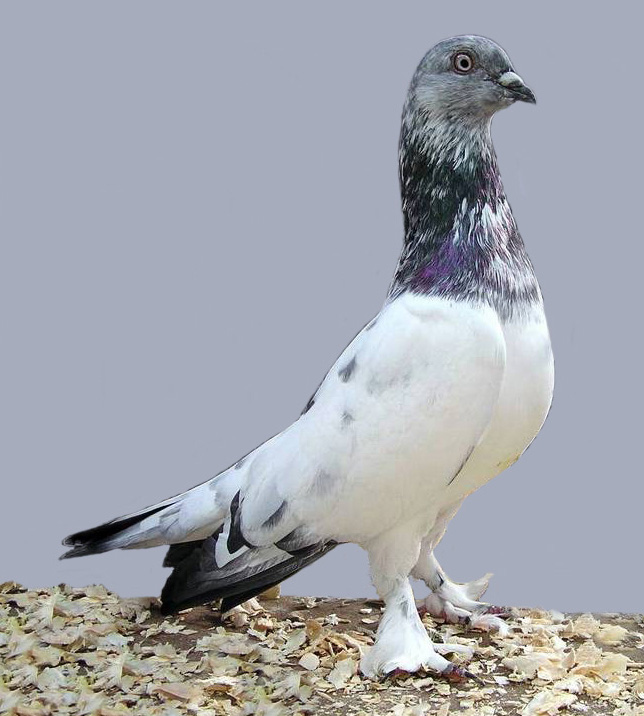 Budapest Highflier (aka, Poltli)